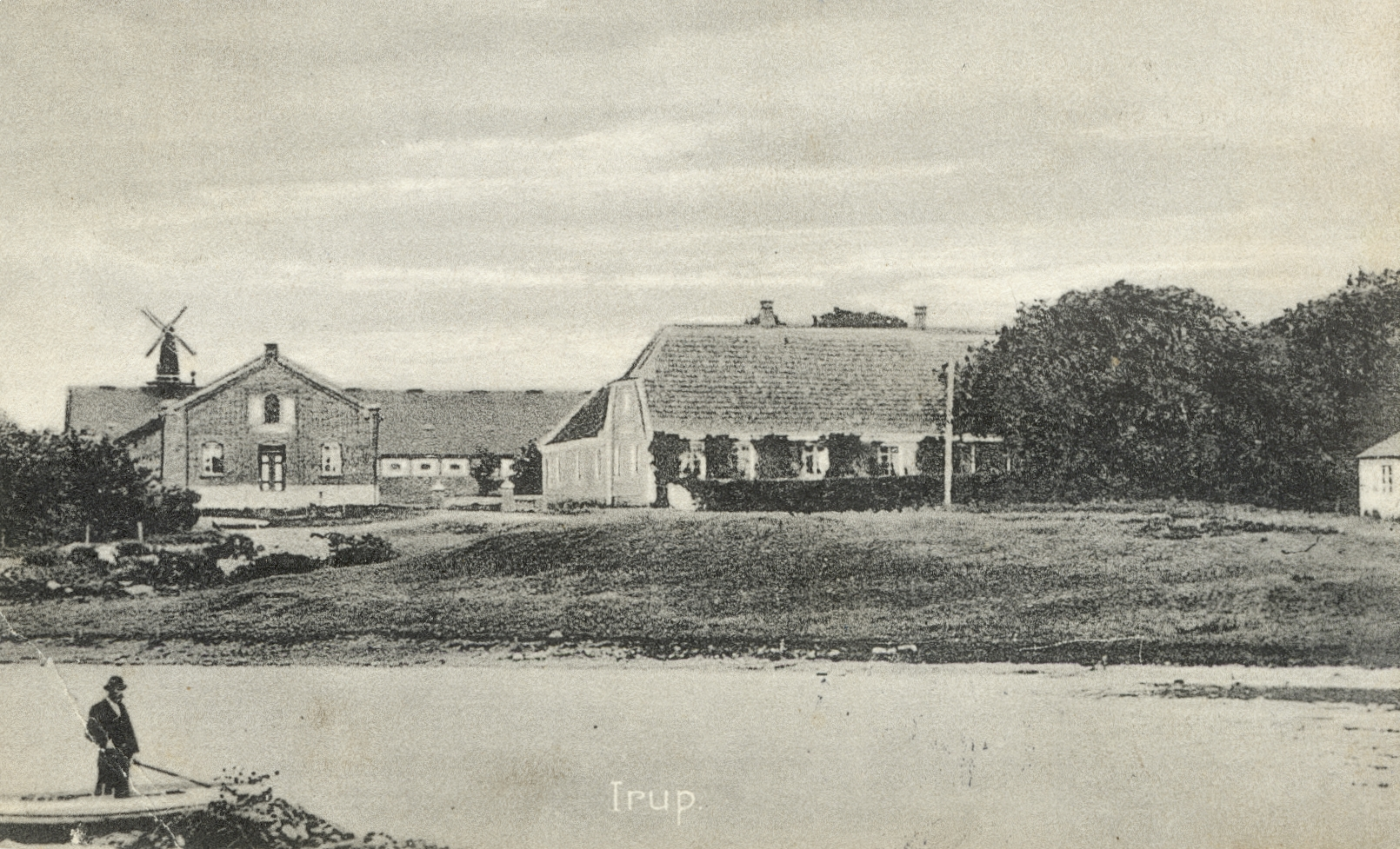 Irup, Hørdum Sogn, Sydthy